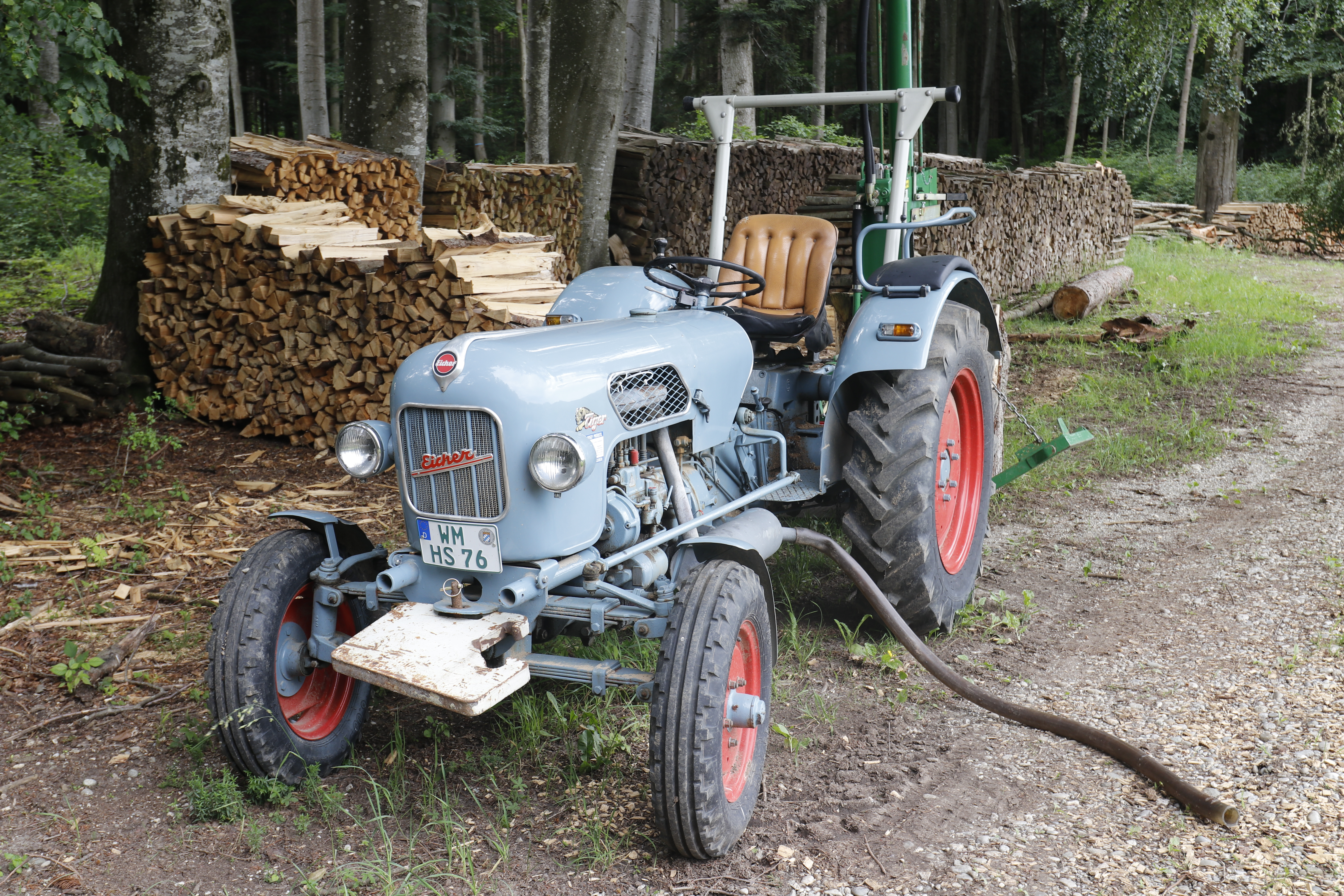 Eicher EM 235 Tiger II, Baujahr zwischen 1963 und 1969. Im Einsatz 2020-06 als Geräteträger mit einem Holzspalter